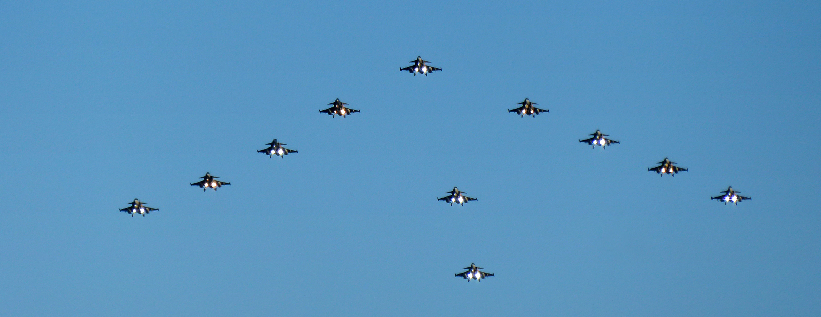 I samband med Flygvapnets 90 års jubileum flög 11 Jas 39 Gripen i formation (julgran) över Ystad 12 dec 2016.